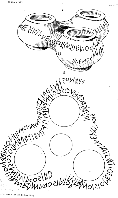 Illustration from Hermes. Zeitschrift für classische Philologie 16 (1881)